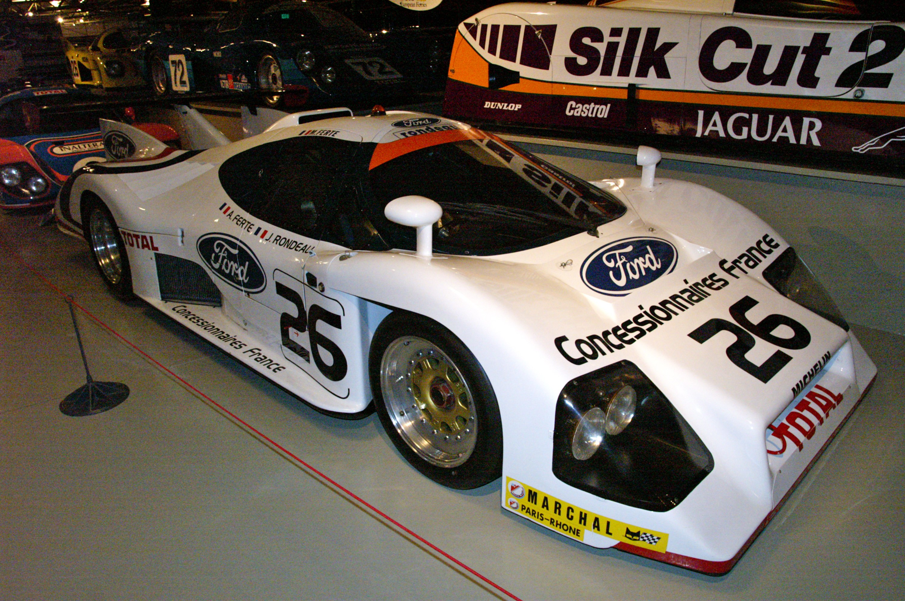 Le Musee des 24 Heures